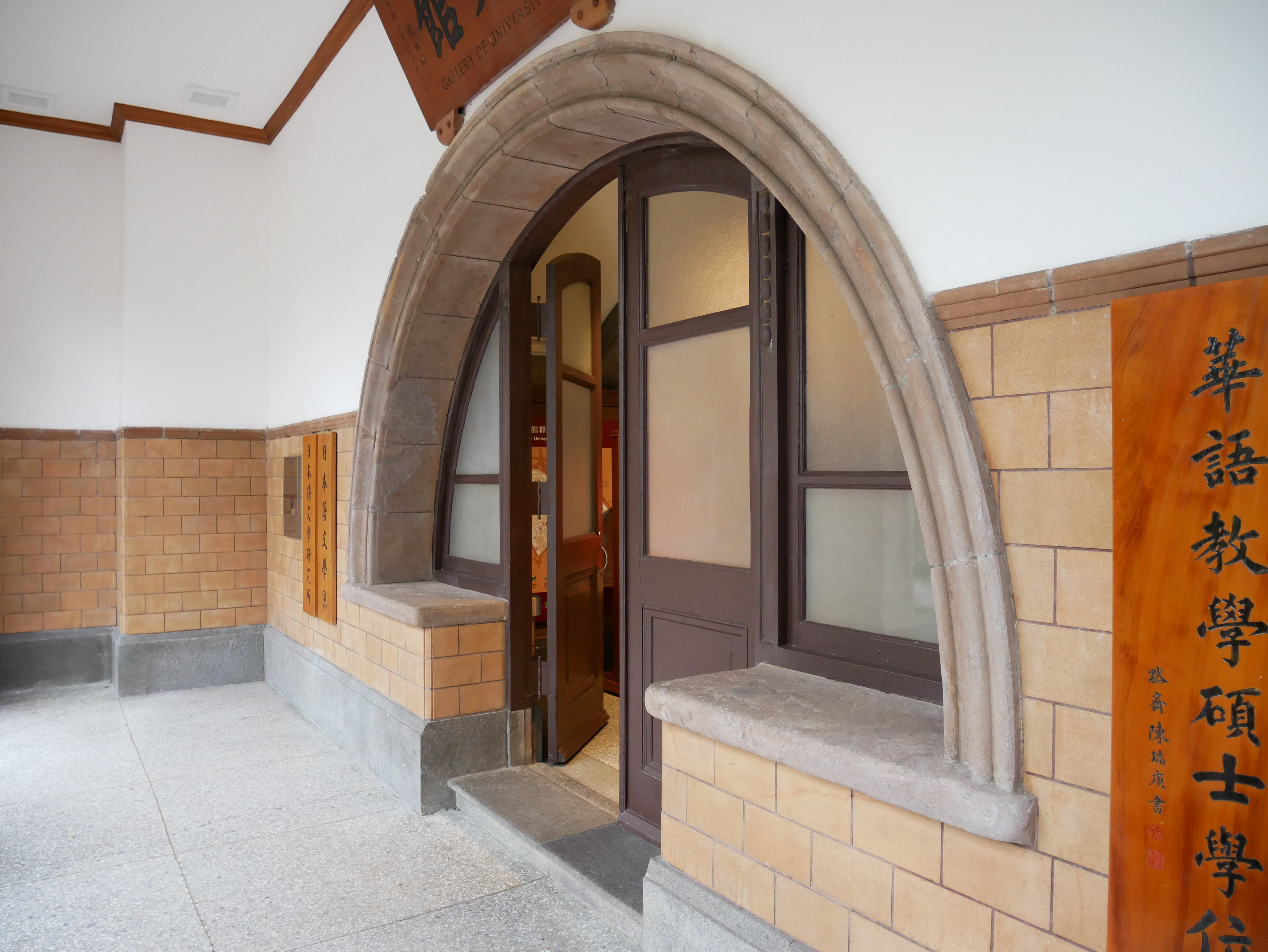 國立臺灣大學校史館入口，原臺北帝國大學圖書館入口。